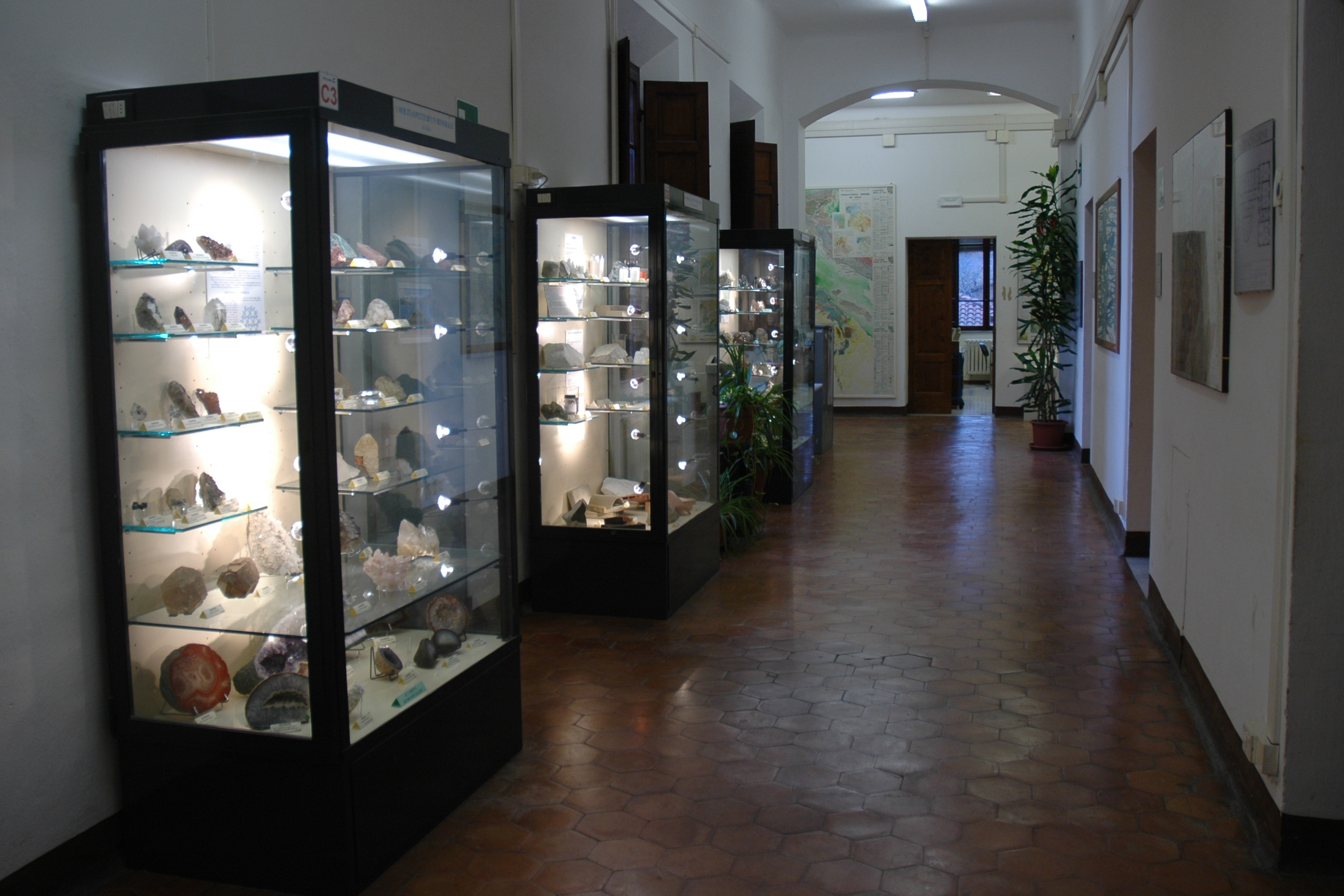 Uno dei percorsi didattici del museo di Scienze Terra - Università di Siena, Dipartimento di Scienze della Terra